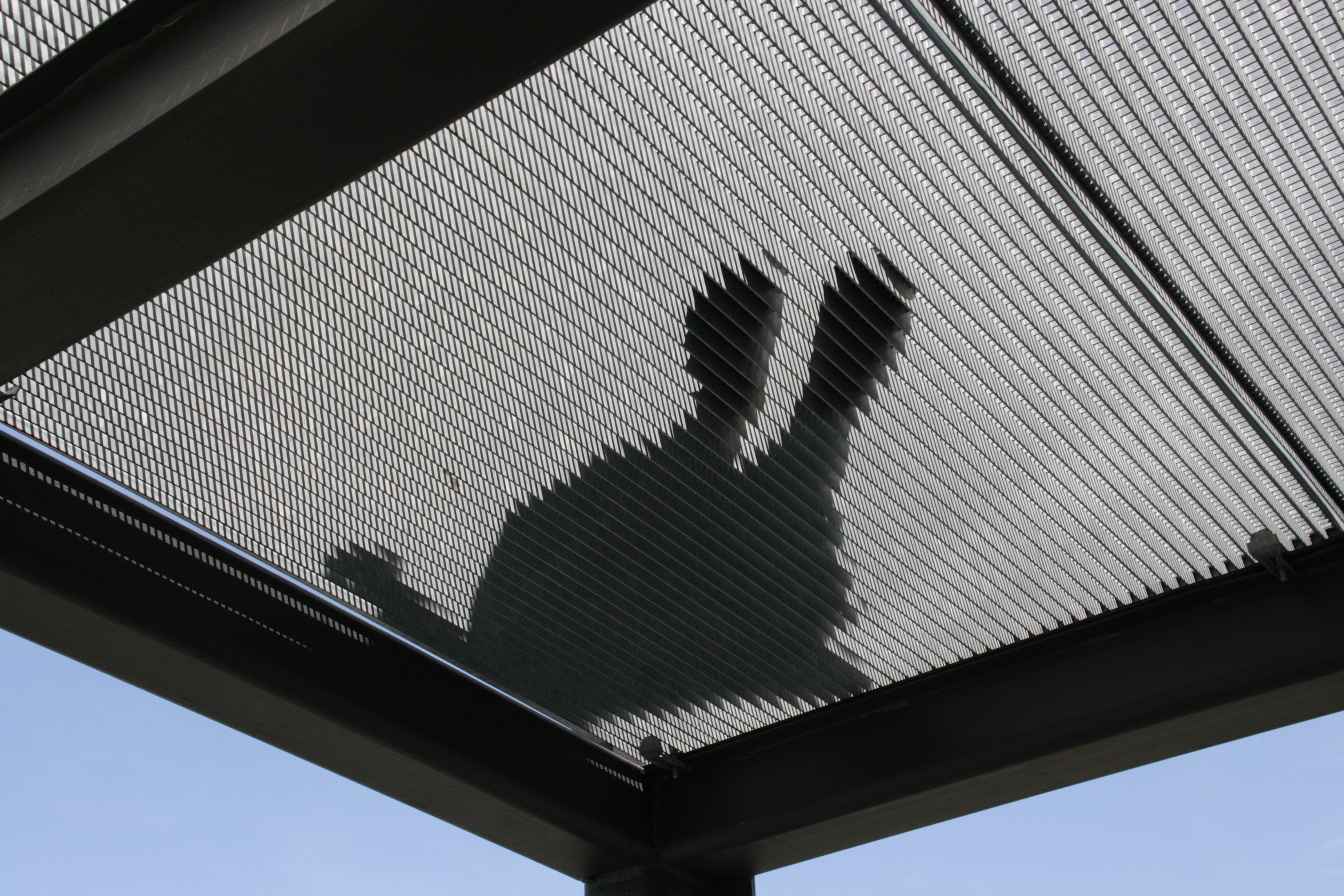 Ewald-Empore auf Halde Hoheward in Herten